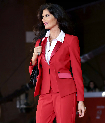 Attrice, show-girl e cantante italiana. foto scattata durante il red carpet del Festival del Cinema di Roma